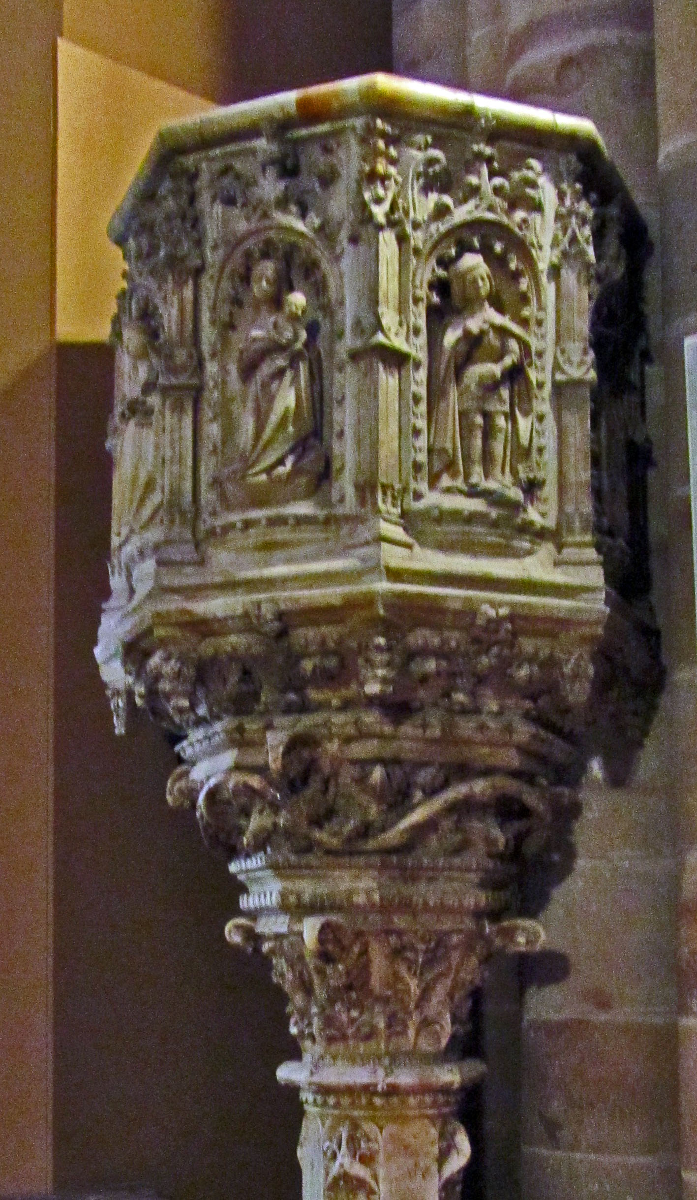 Púlpito del lado de la epístola de la catedral de Sigüenza.